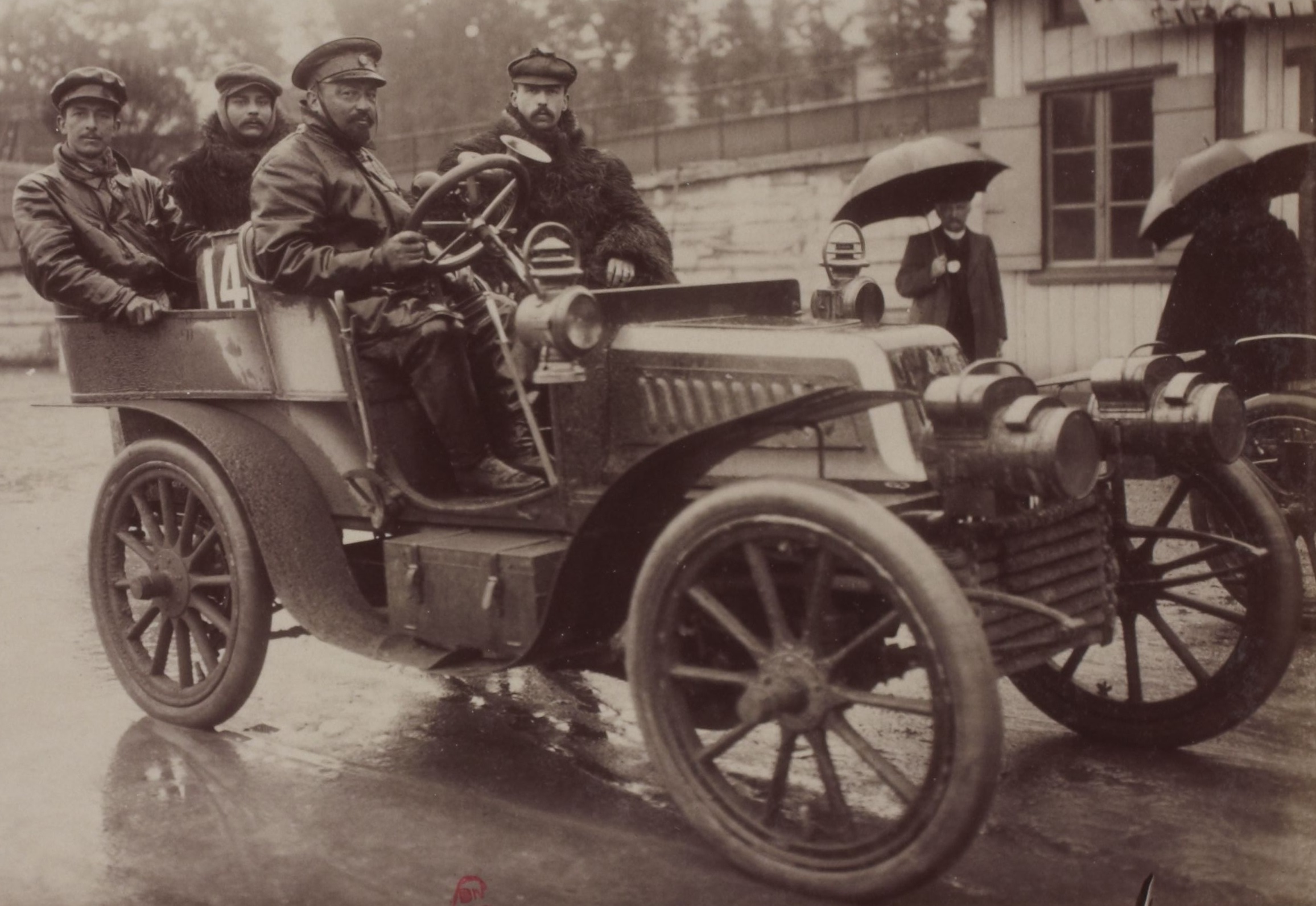 [Collection Jules Beau. Photographie sportive] : T. 17. Année 1902 / Jules Beau : F. 42. [Concours de consommation, Parc des Tuileries, 17 mai 1902]